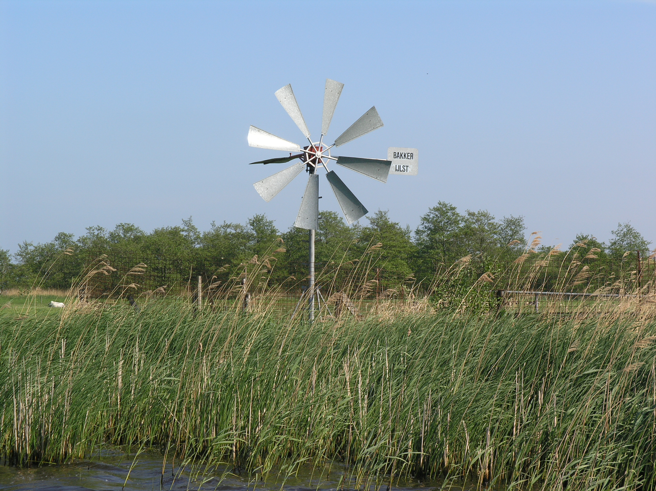 Terherne kleine windmotor